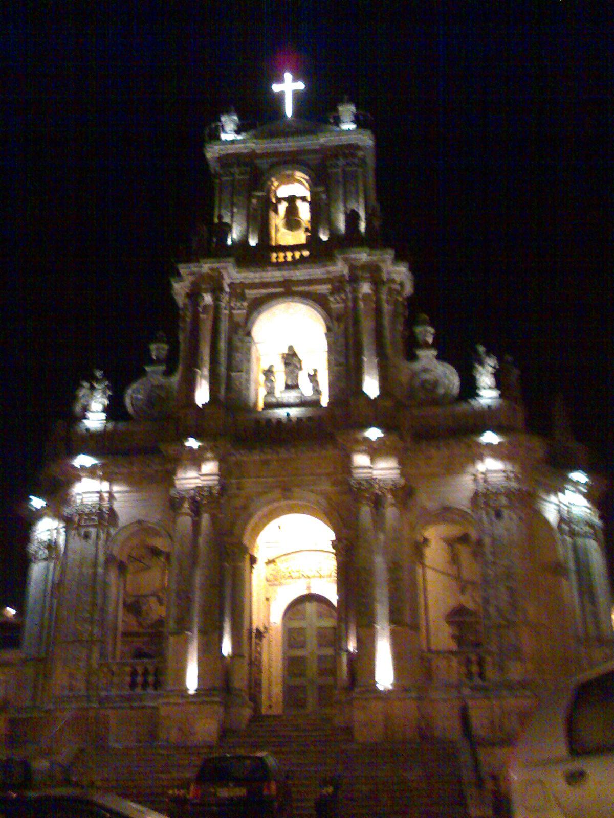 Fotografia notturna della chiesa di San Paolo nel paese di Palazzolo Acreide (SR) Foto personale. Palazzolo A., dicembre 2006 by Alessandro "Abe" Valvo